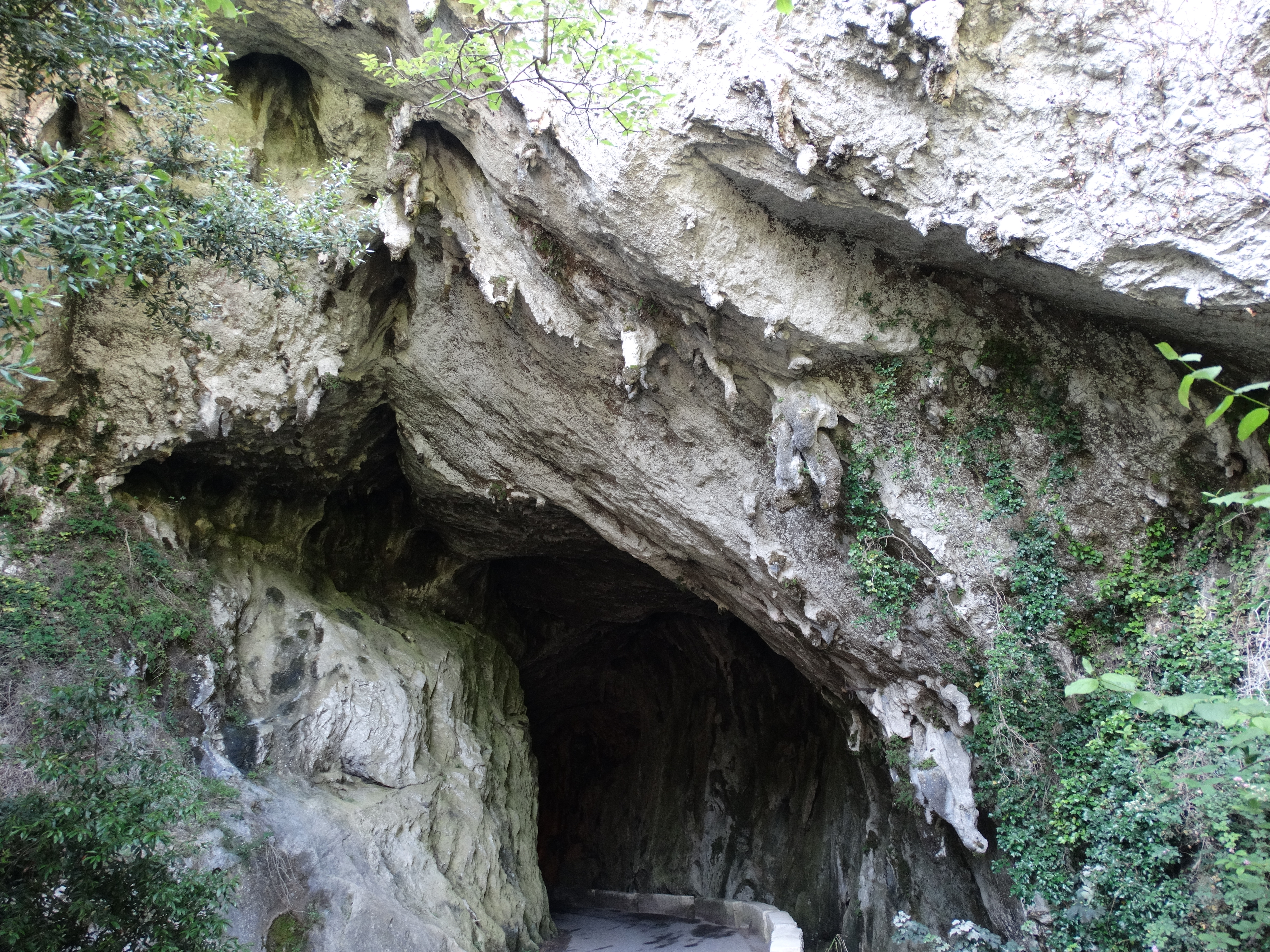 La Cuevona en Asturias a unos kilómetros de Ribadesella. Es una cueva natural con estalactitas y estalagmitas cuyo camino de unos 300 metros fue asfaltado y convertido en carretera; discurre paralelo un arroyo. Es el único acceso a la aldea llamada Cueves o Cuevas del Agua. Se puede recorrer en vehículo o andando.